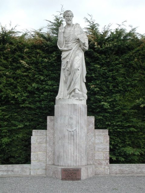 Statue de St. Pierre à Villers-deux-Églises (Belgique)